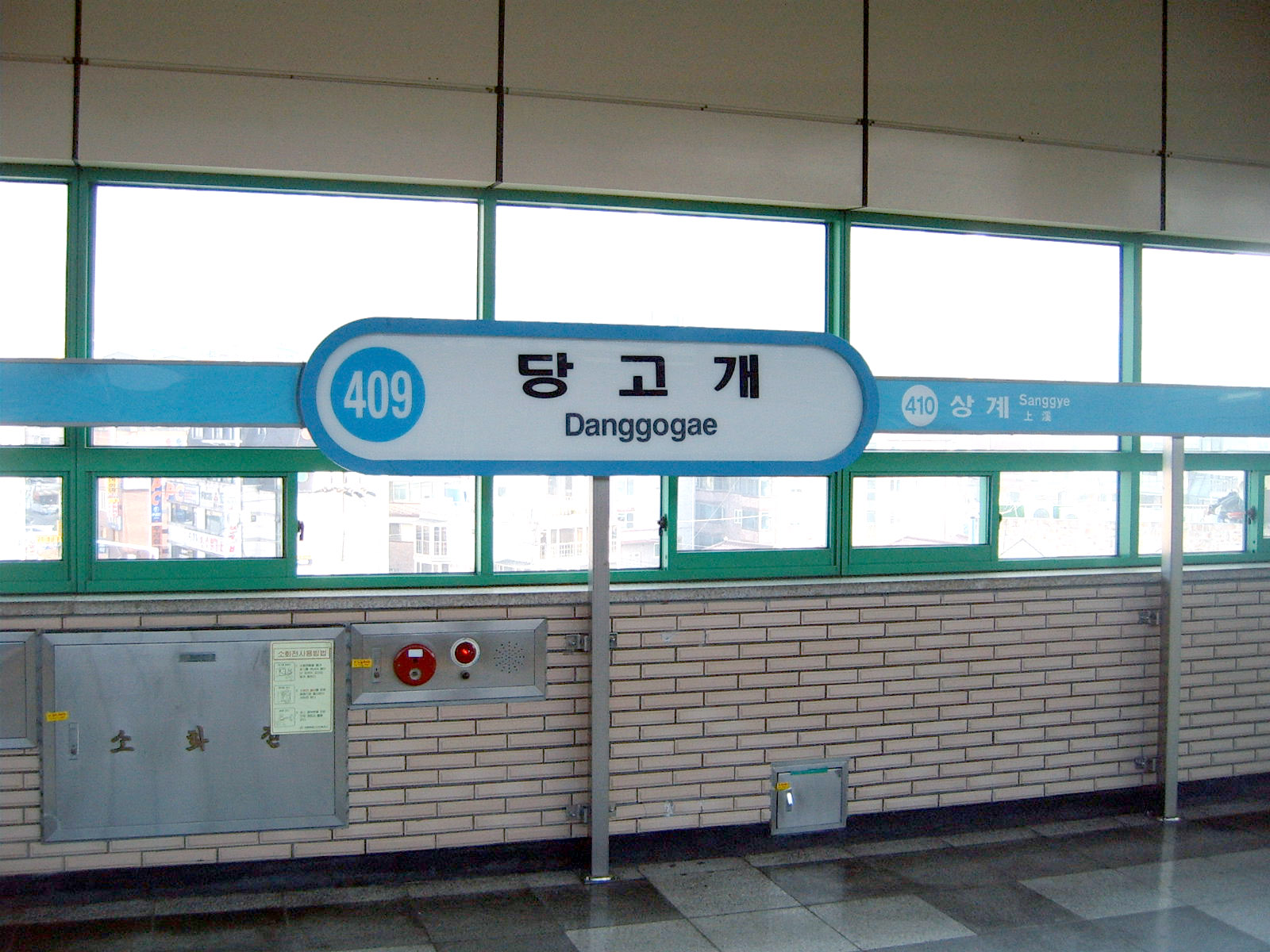 Danggogae Station